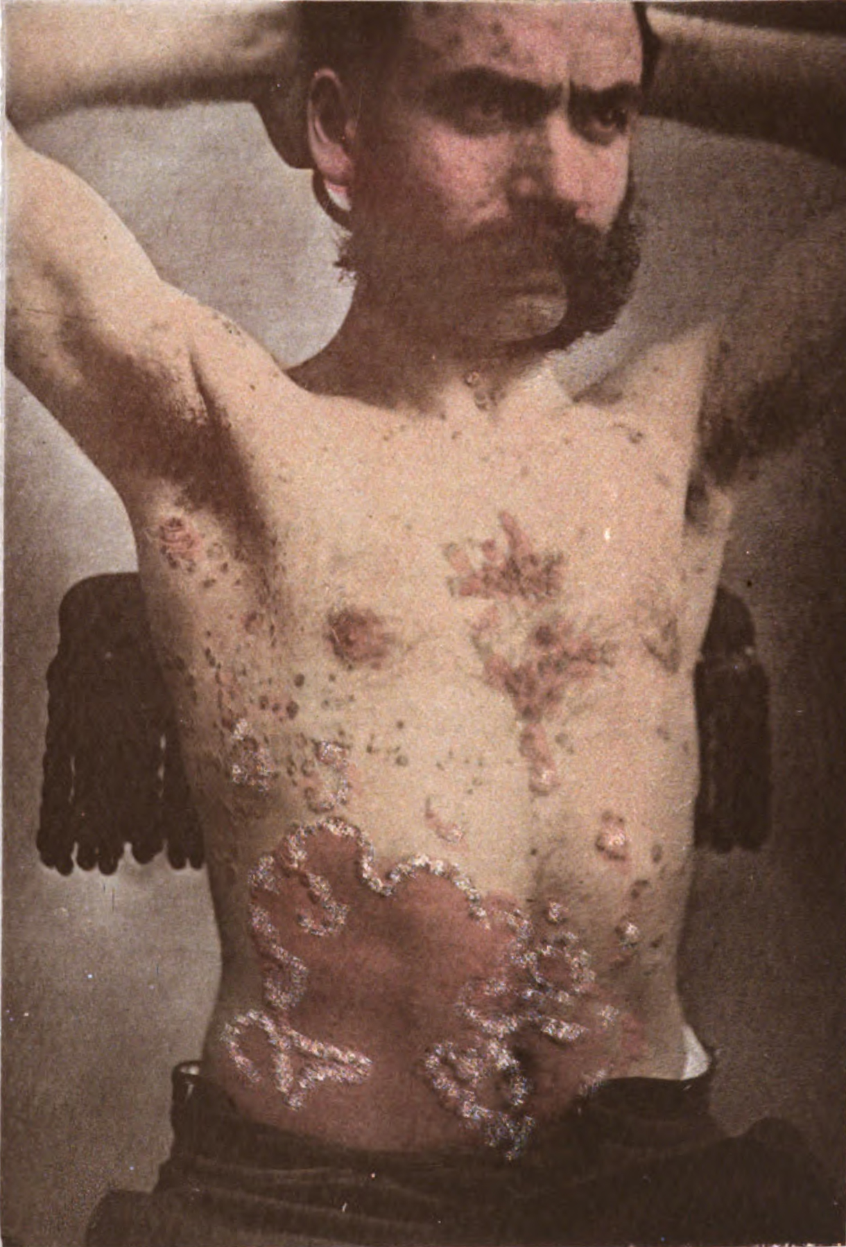 Psoriasis annulata